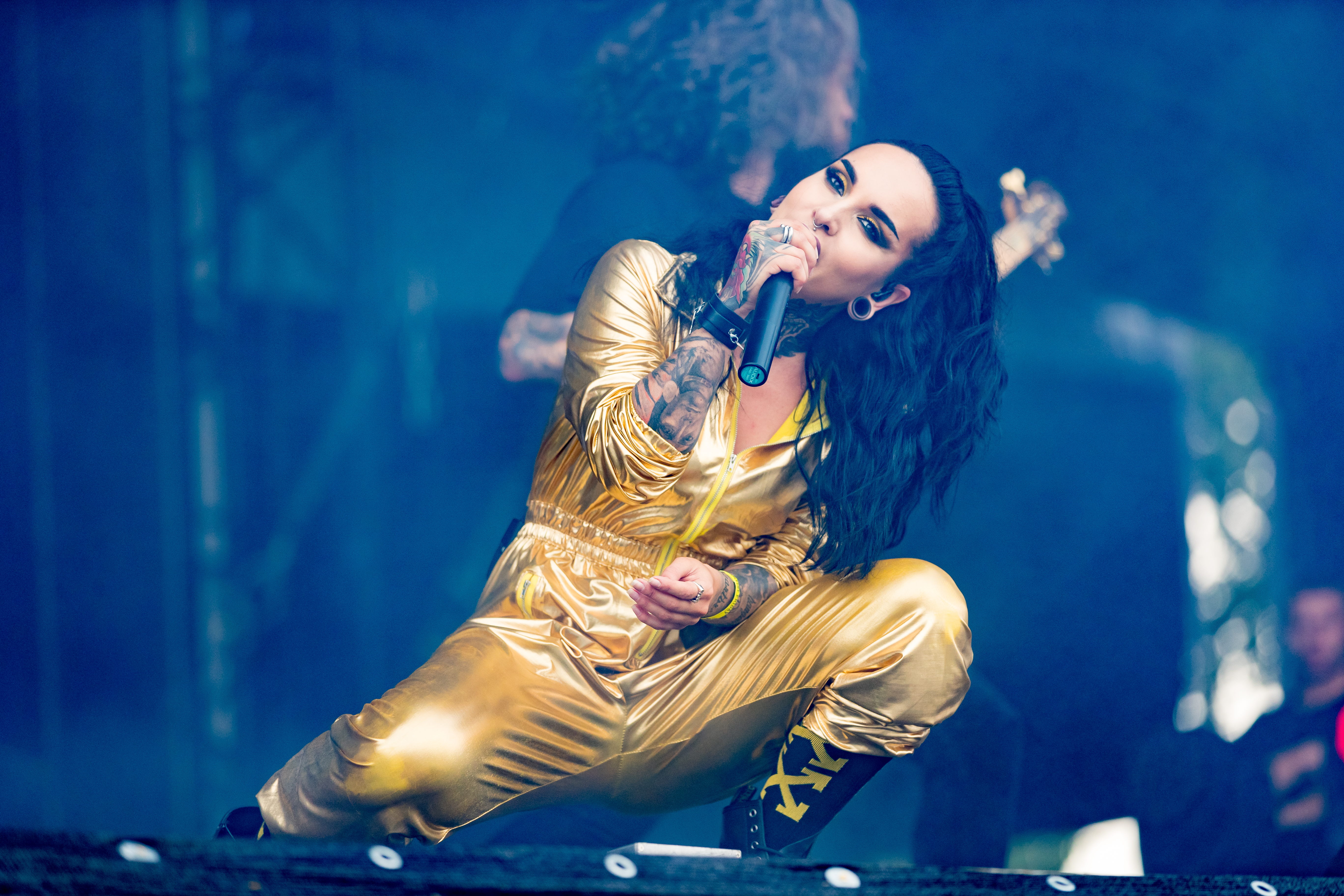 Jinjer during Wacken Open Air at The Holy Wacken Land, Wacken, Schleswig-Holstein, Germany on 2019-08-02, Photo: Sven Mandel